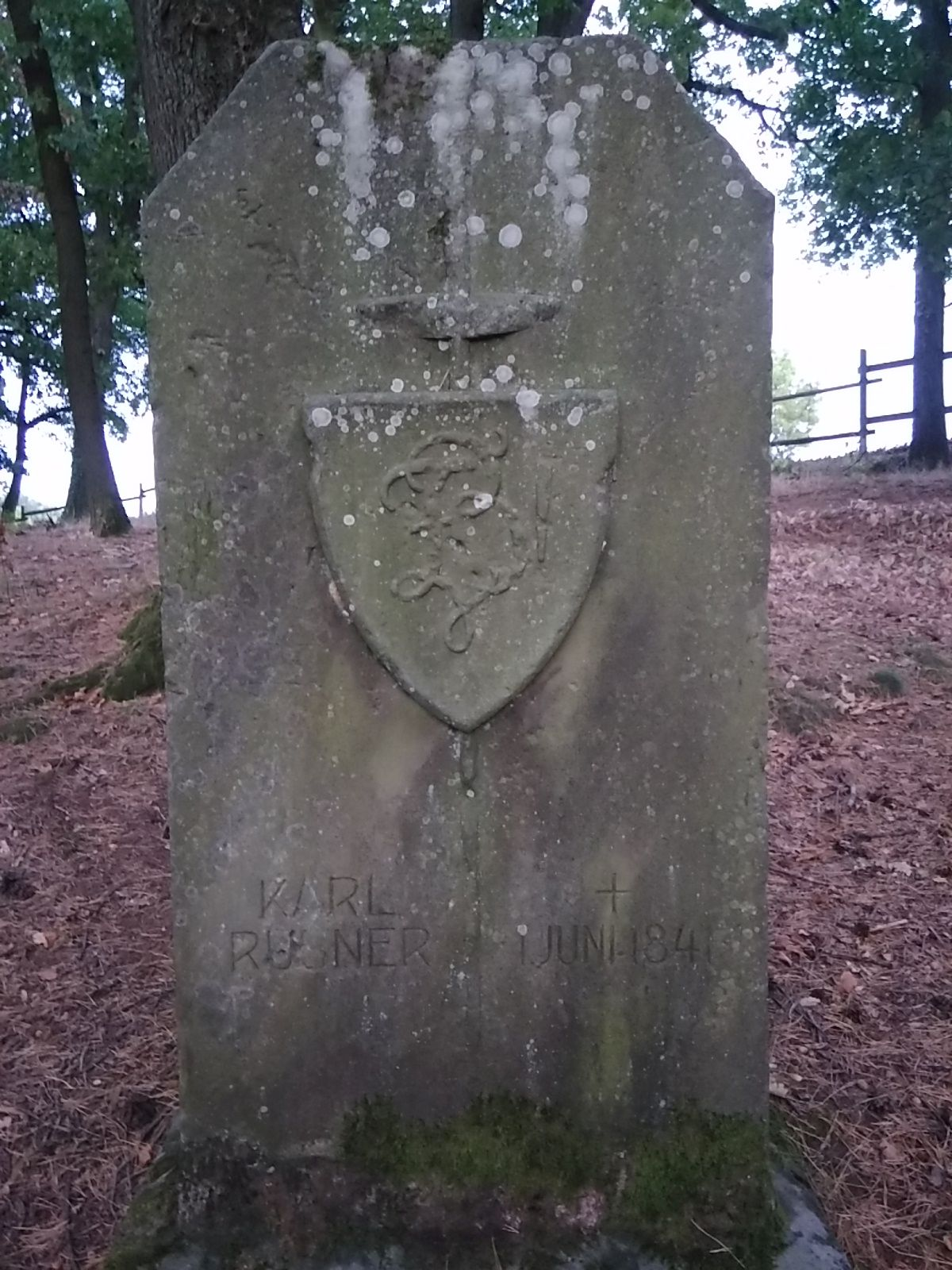 Rathsberg, Rubnerstein, Karl Rubner, gest. 1. Juni 1841